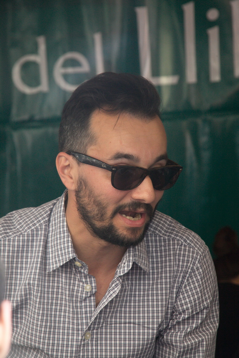 Signatura de llibres en la Diada de Sant Jordi-2015 a Barcelona